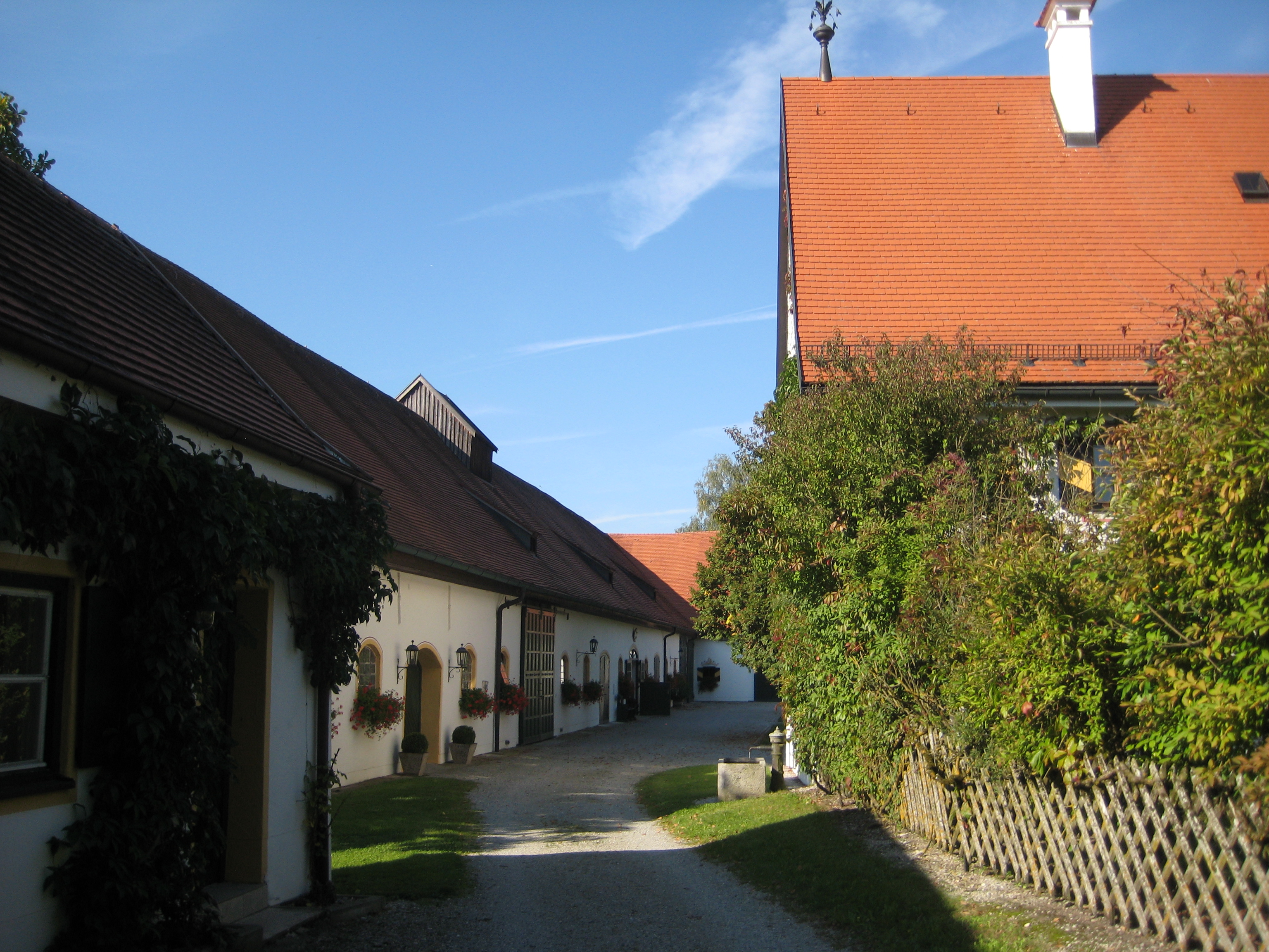 Zellhof bei Schöngeising.